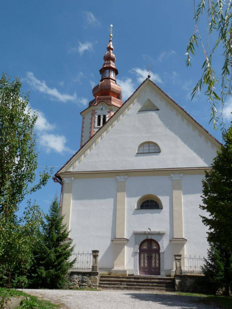 Sveti Matija, Bučka